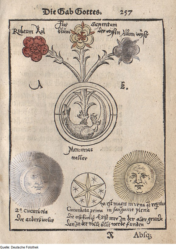 Original image description from the Deutsche Fotothek Theosophie & Alchemie Abbildung, auf der drei Blumen mit gemeinsamer Wurzel aus dem hermetischen Ei entspringen, in dem der Ouroboros liegt: die rote Blume des Goldes, die weiße des Silbers und zwischen diesen beiden die blaue Blume der Weisheit (flos sapientum).